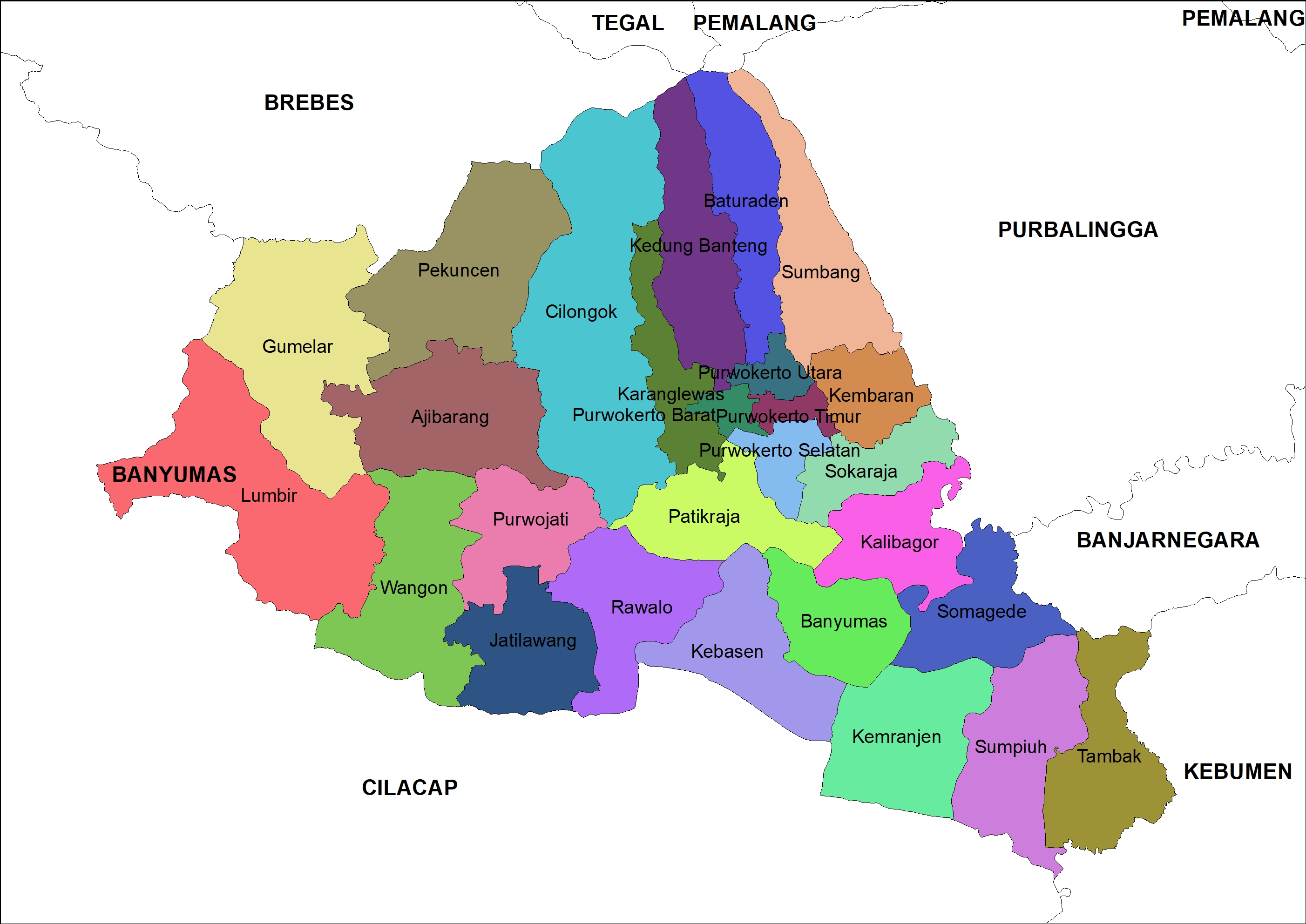 Peta administrasi pembagian kecamatan di Kabupaten Banyumas. Kabupaten Banyumas terdiri dari 27 kecamatan